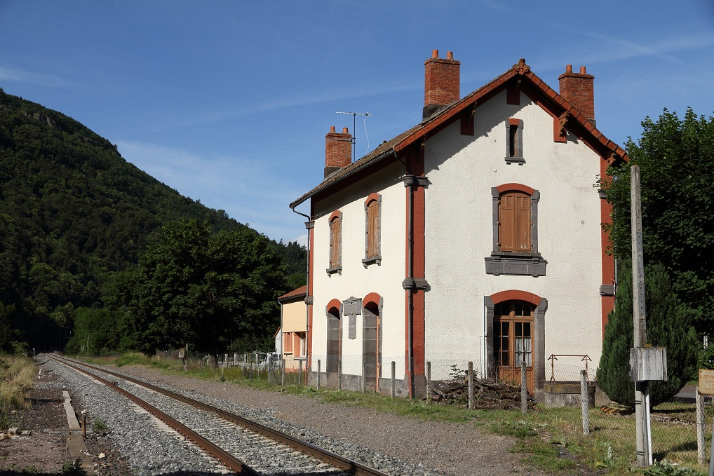 Vue de l'ancien bâtiment voyageurs et de la voie en direction de Neussargues (juin 2011), Auvergne, France.